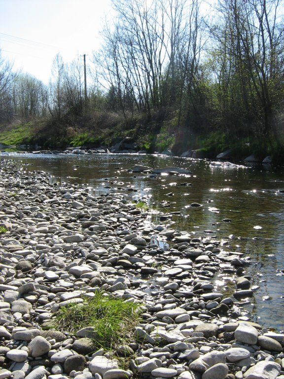 Stadniki (województwo małopolskie) - Krzyworzeka.